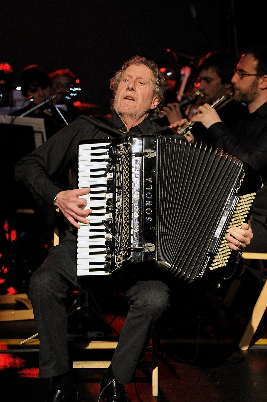 Enrike Zelaia, Altsasuko soinu jotzailea, bere sorterrian egin zioten omenaldiaren bukaeran jotzen.